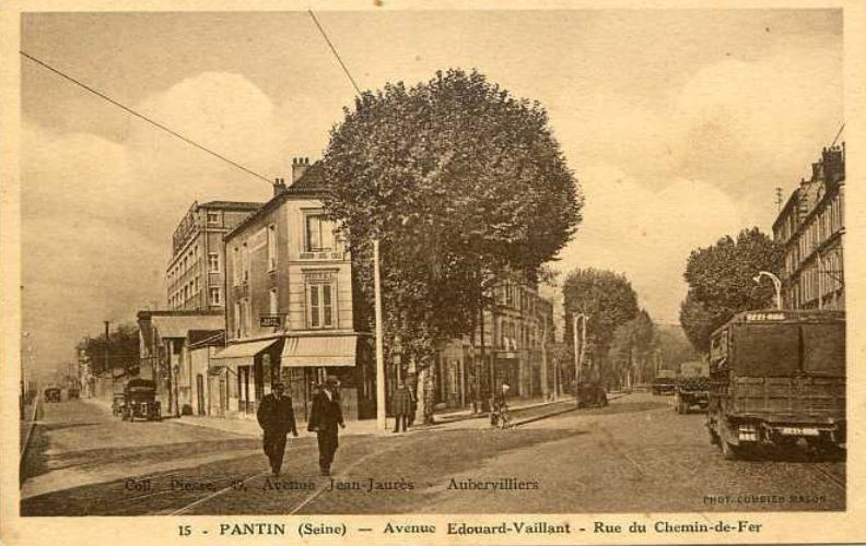 Pantin: Carrefour de l'avenue Edouard-Vaillant et de la rue du Chemin-de-Fer